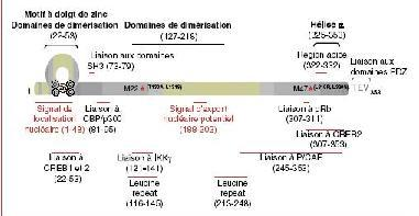 Structure...